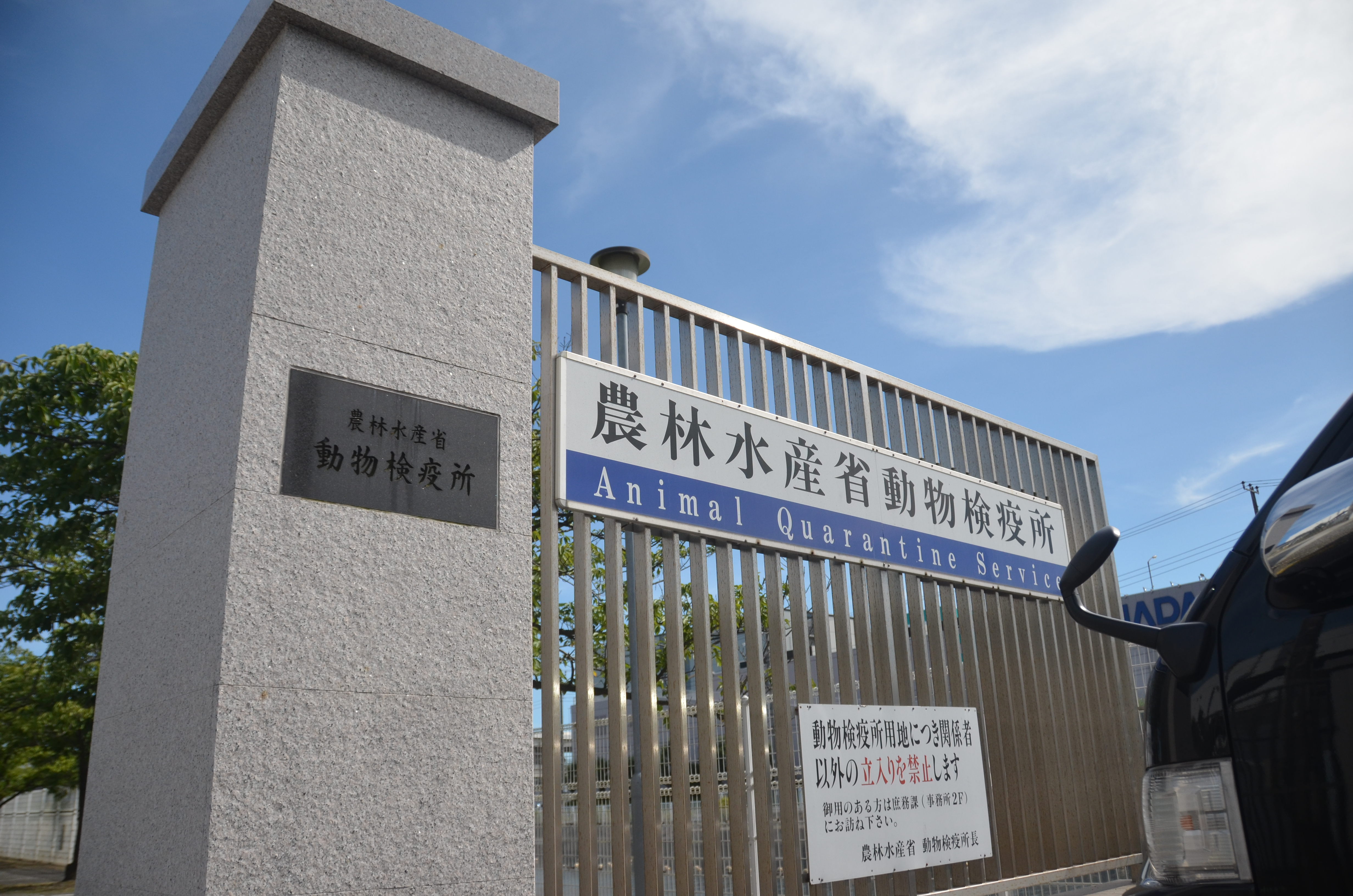 動物検疫所、横浜本所の正門（2019年8月撮影）